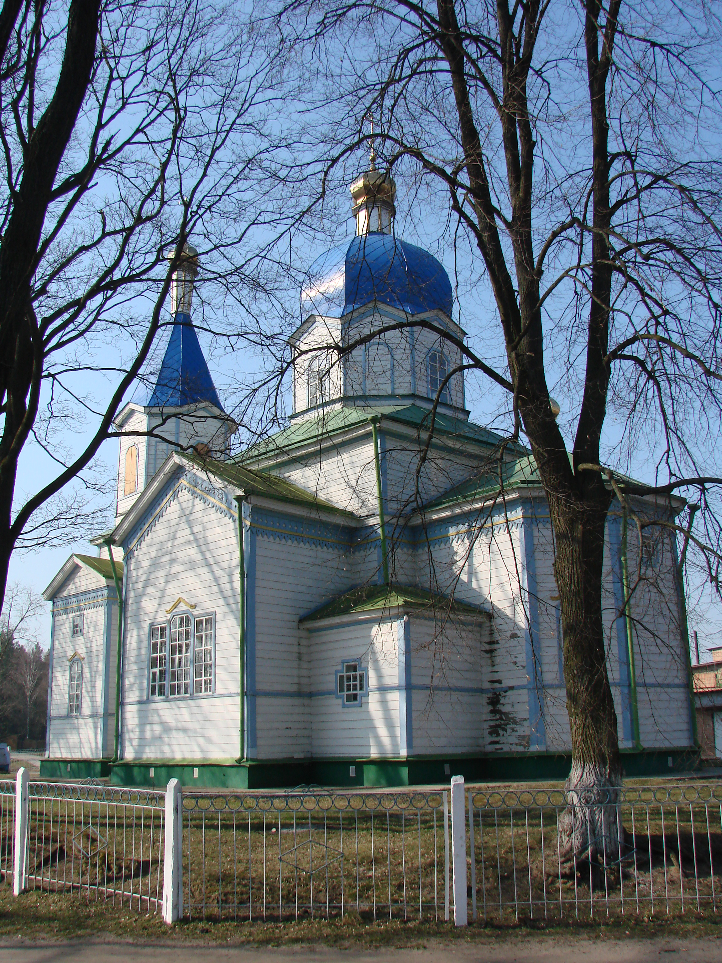 Церква Олександра Невського (дер.), село Феневичі